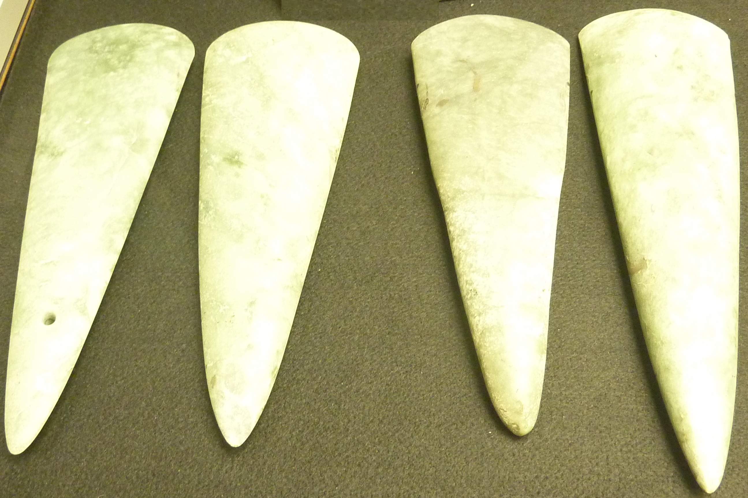 Quatre lames de haches polies en jadéite d'origine alpine (cette roche était exploitée au néolithique dans les Alpes italiennes) trouvées au Petit-Rohu en Saint-Pierre-Quiberon (vers 4 500 avant J.-C., Musée de préhistoire de Carnac)